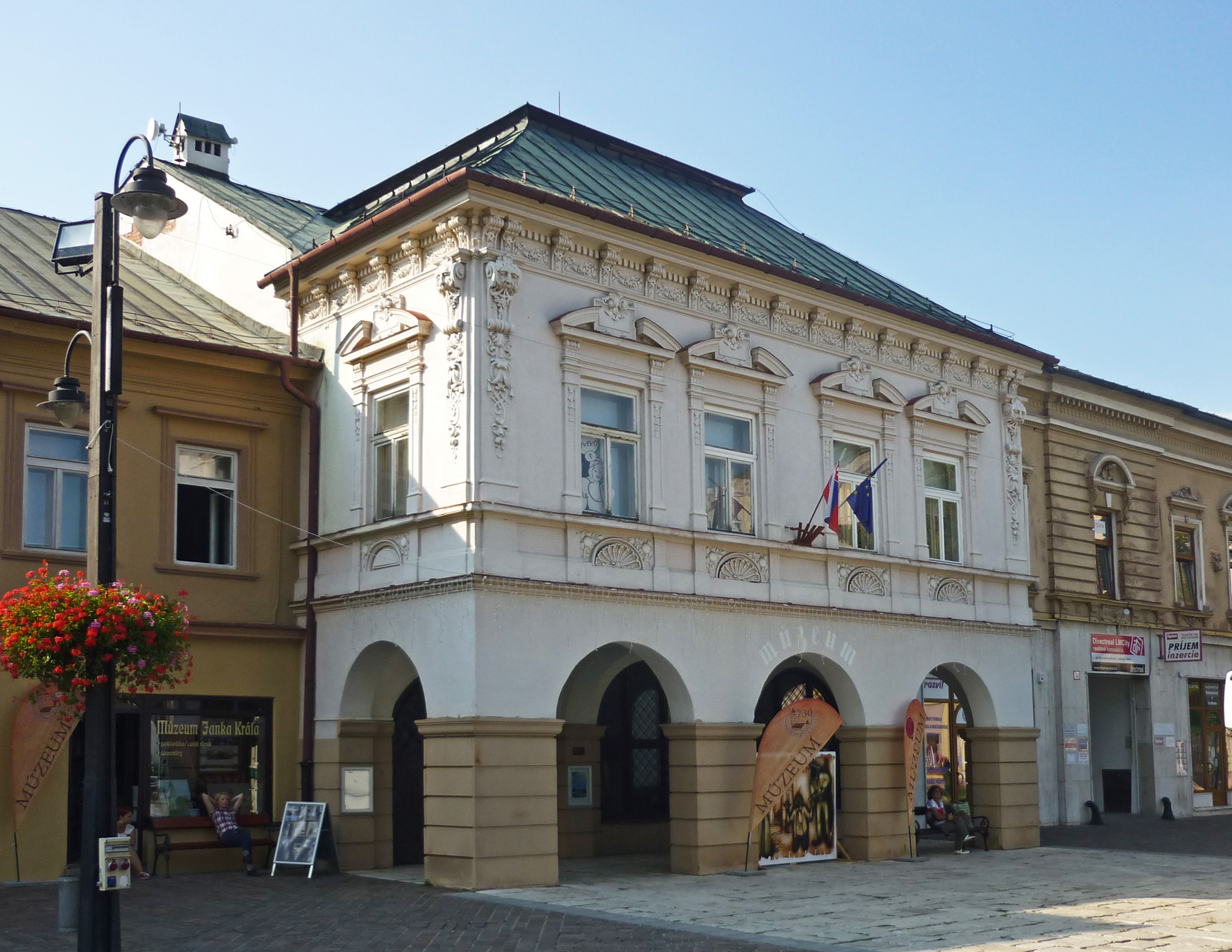 Museum in Liptovský Mikuláš (Sankt Nikolaus in der Liptau) in der Slowakei